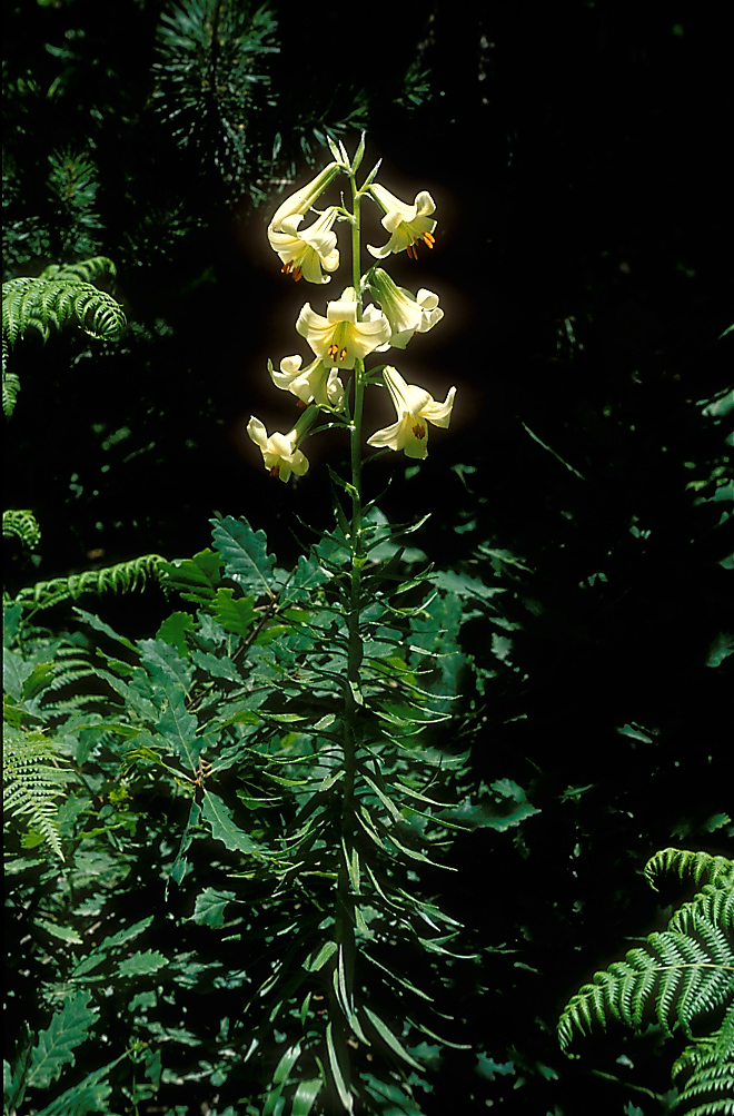 Lilium akkusianum in habitat near Akkus, Turkey